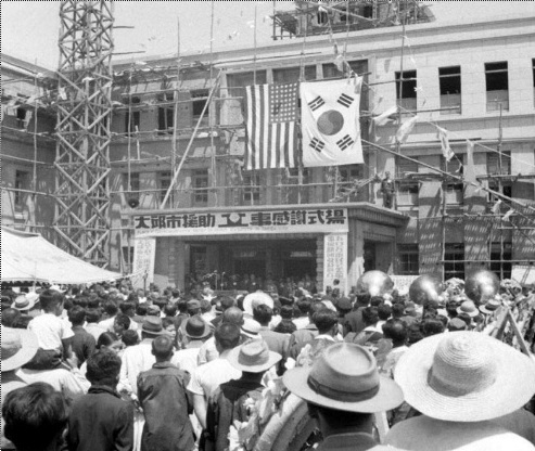 AFAK(대한군사원조)에 대한 대구시 원조 공사 감사식